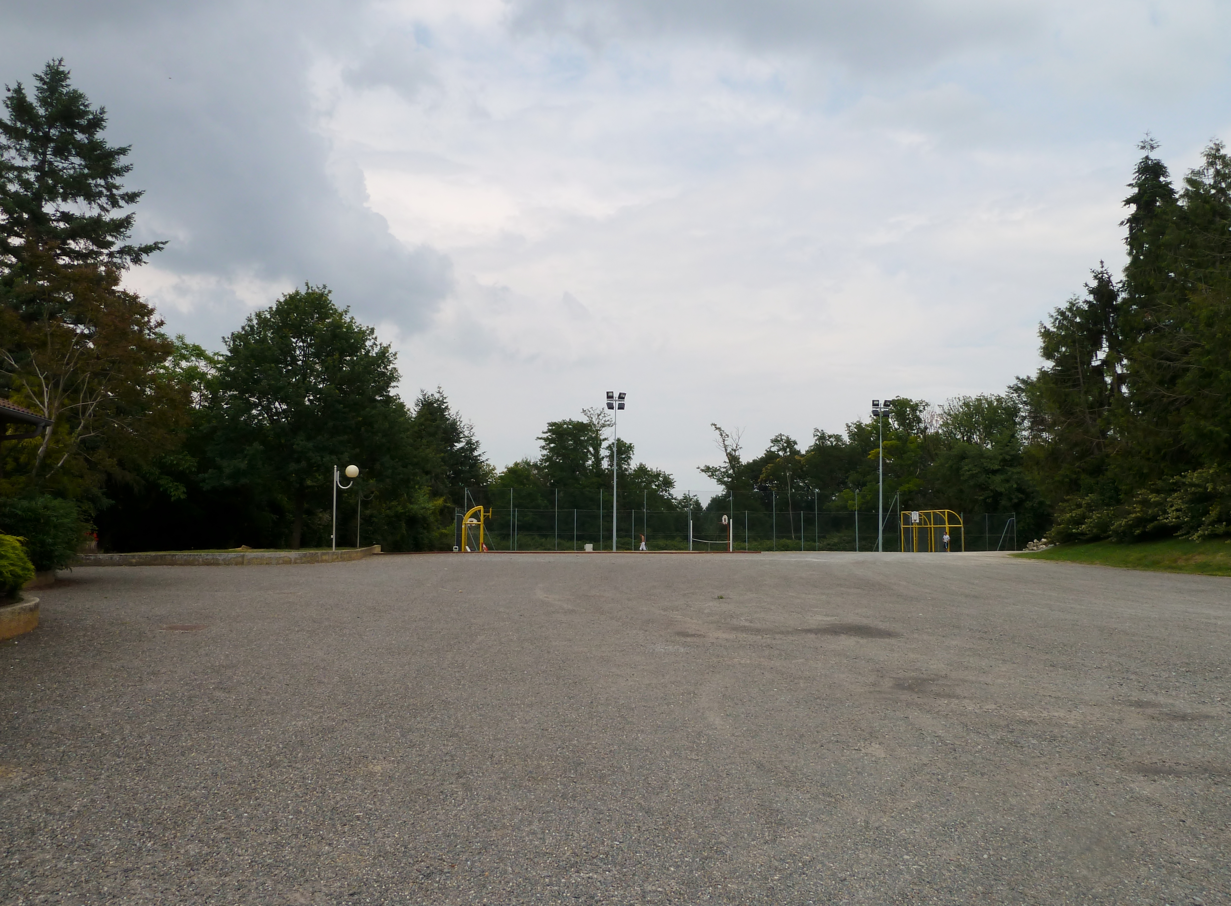 Terrain de sport de Moncaup (Pyrénées-Atlantiques)